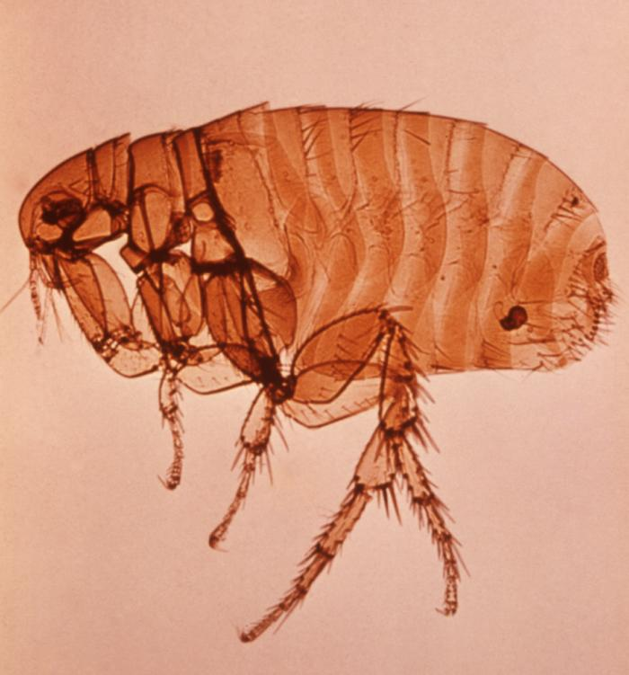 Xenopsylla cheopis femelle (puce du rat) adulte - domaine public - (image id 2741)